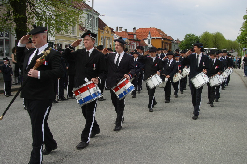 Trommeslager i buekorps: Trommeslagere fra Nordnæs Bataillon.